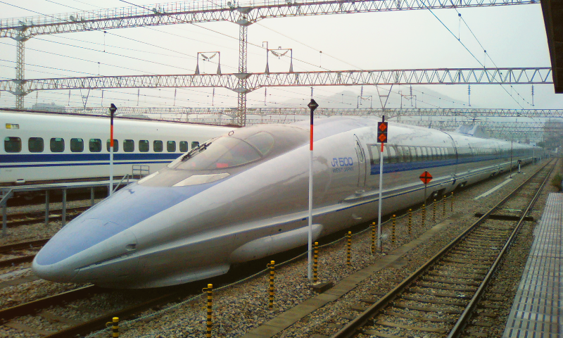 新幹線500系電車、V6編成（8両編成）の写真。博多南駅で撮影。